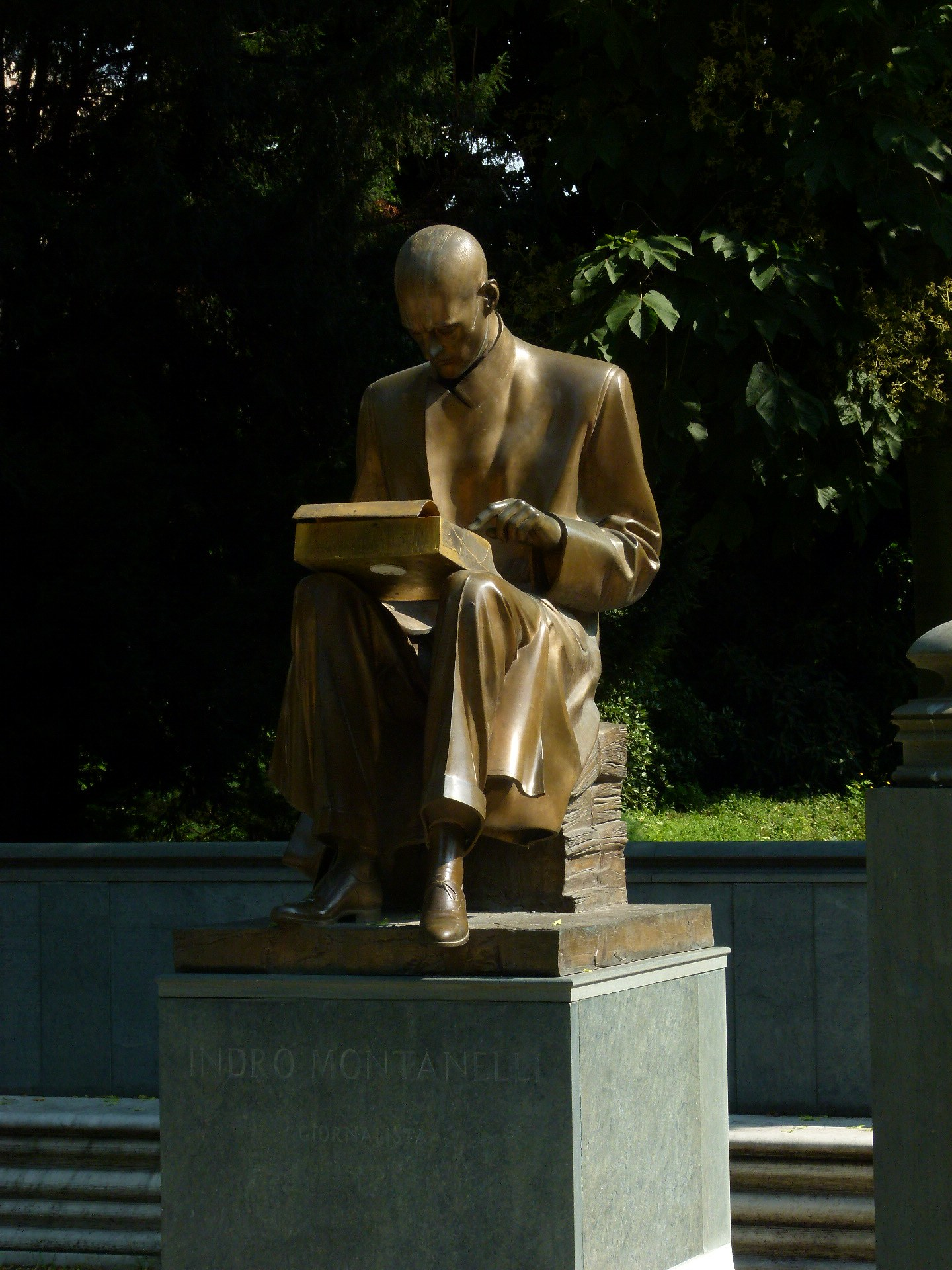 Monument to Indro Montanelli, Milan